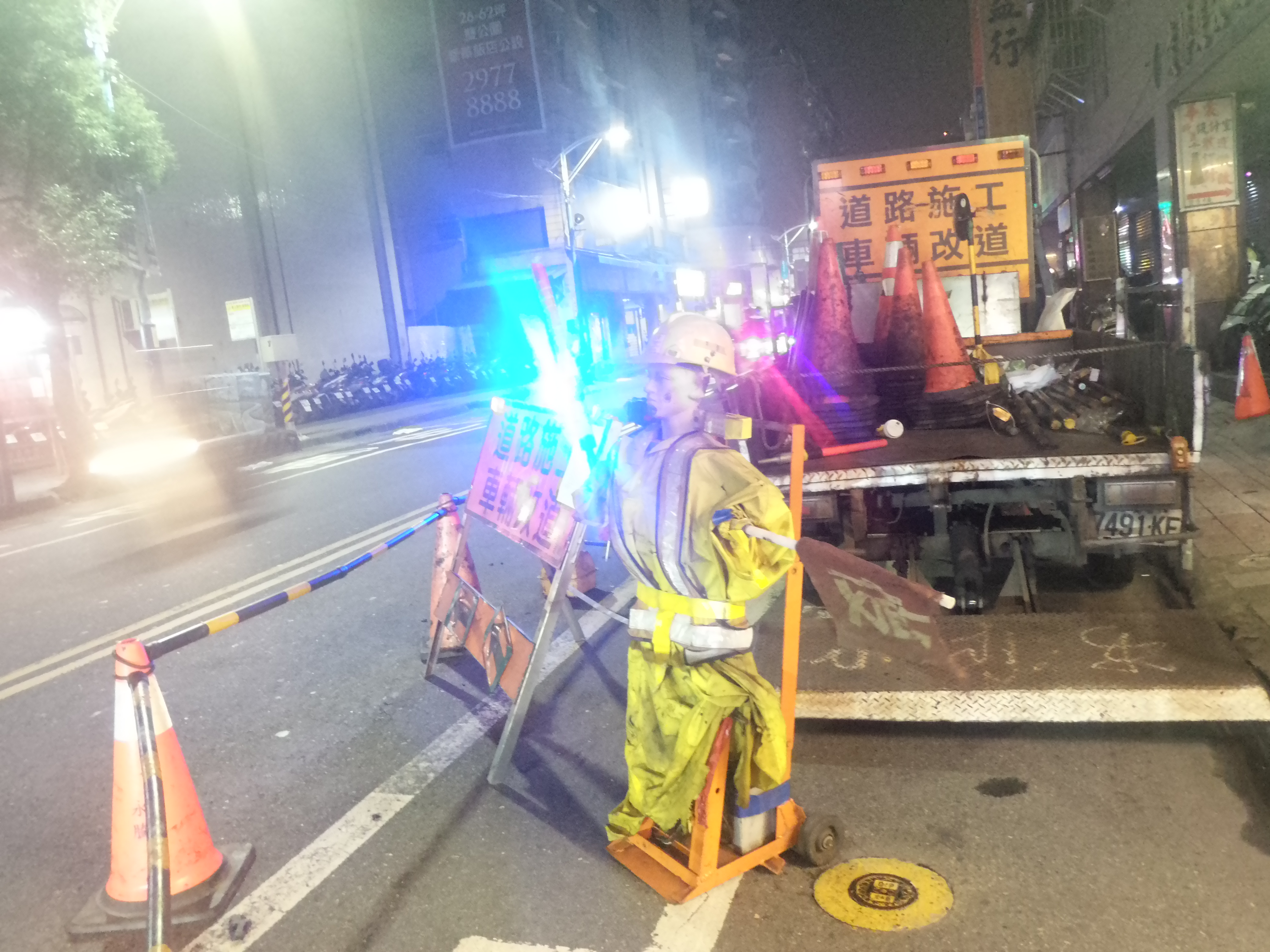 新北市夜間道路施工中的假人。